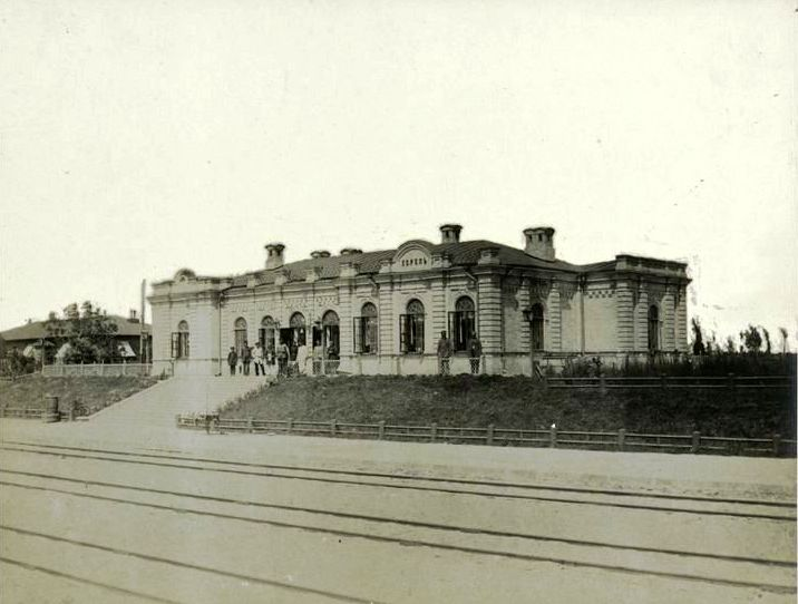 Пасажирська будівля станції Хорол, поч. ХХ ст.